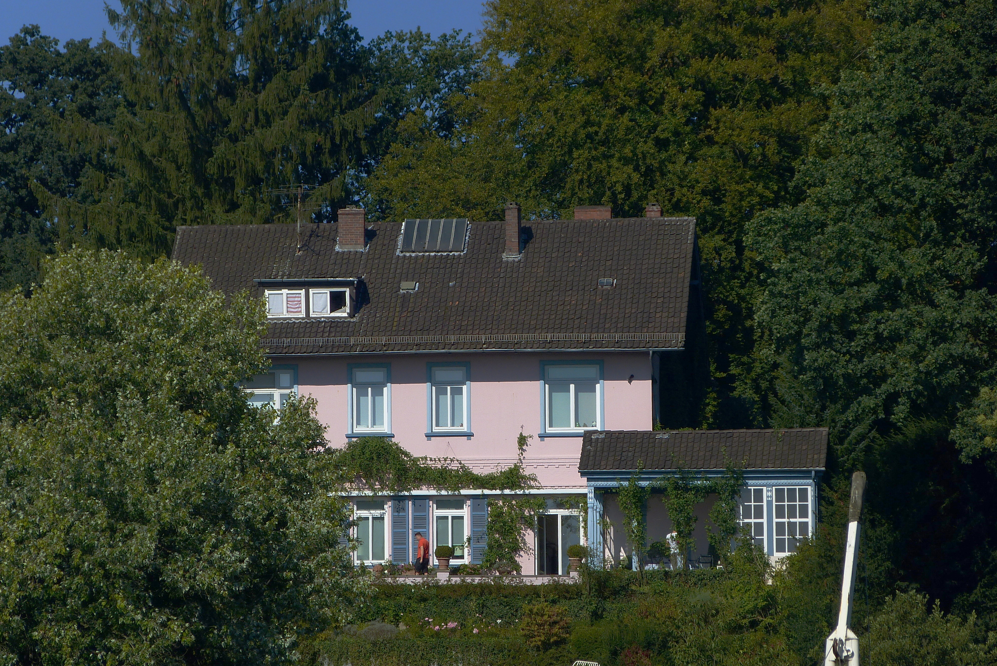 Haus Lichtenegg in Bremen, Lesmonastraße 66Das abgebildete Objekt ist ein geschütztes Kulturdenkmal in der Freien Hansestadt Bremen, mit der Nr. 1295 beim Landesamt für Denkmalpflege registriert.